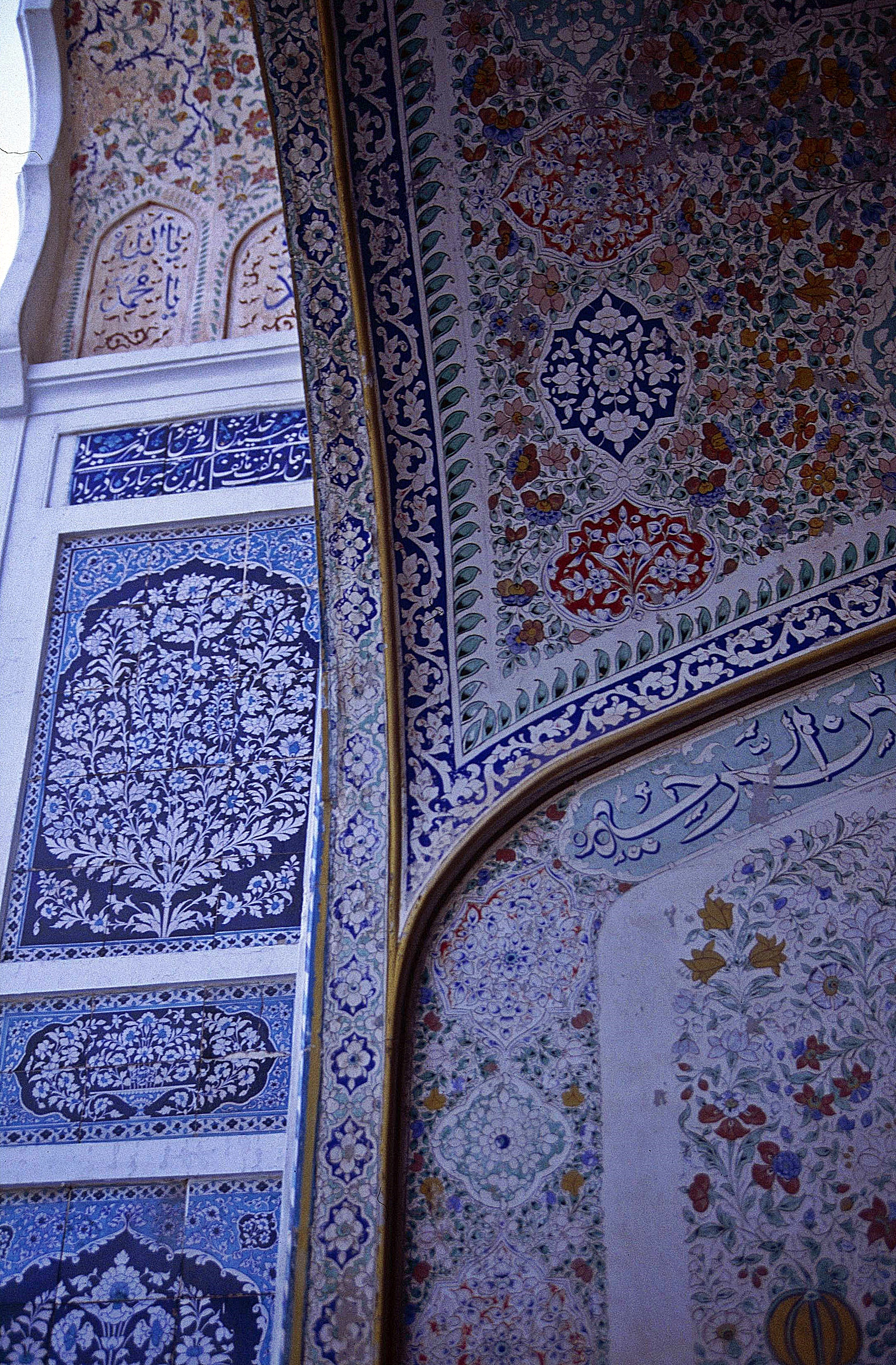 Multan: Detail der Freitagsmoschee